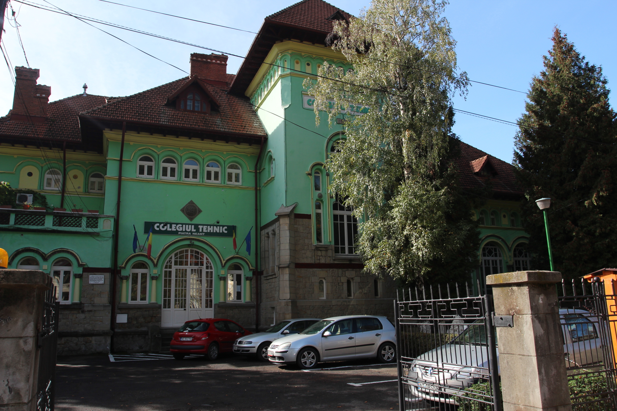 Colegiul Tehnic